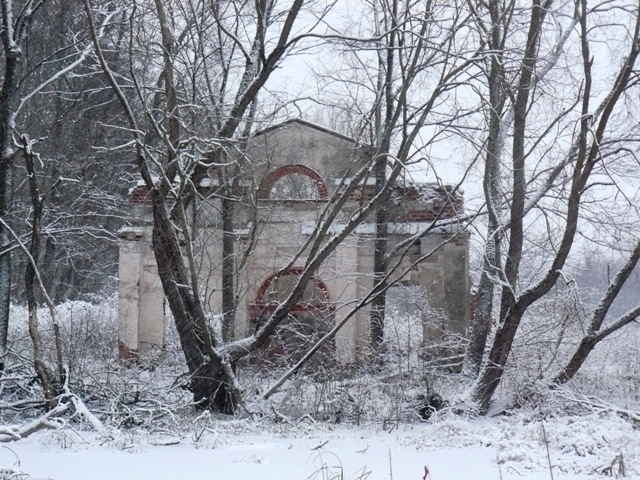 Руины усадьбы Абрамовичей, конец 18 в. Крикалы, Поставский район, Витебская область. Фото путешествия по Беларуси.